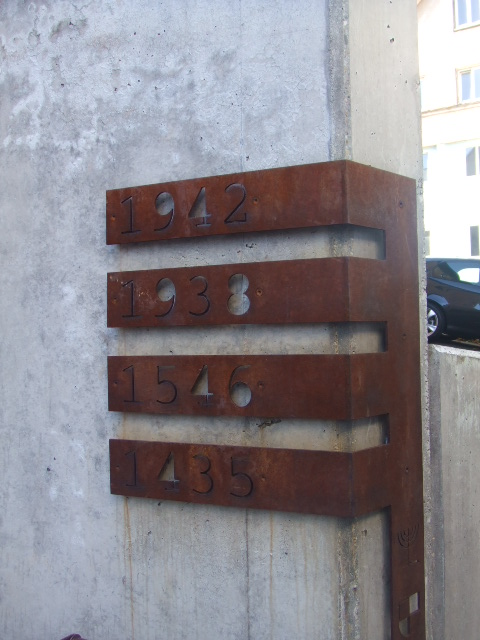 Mahnmal vor der Synagoge Hechingen Vier Jahreszahlen des Unrechts gegenüber Juden